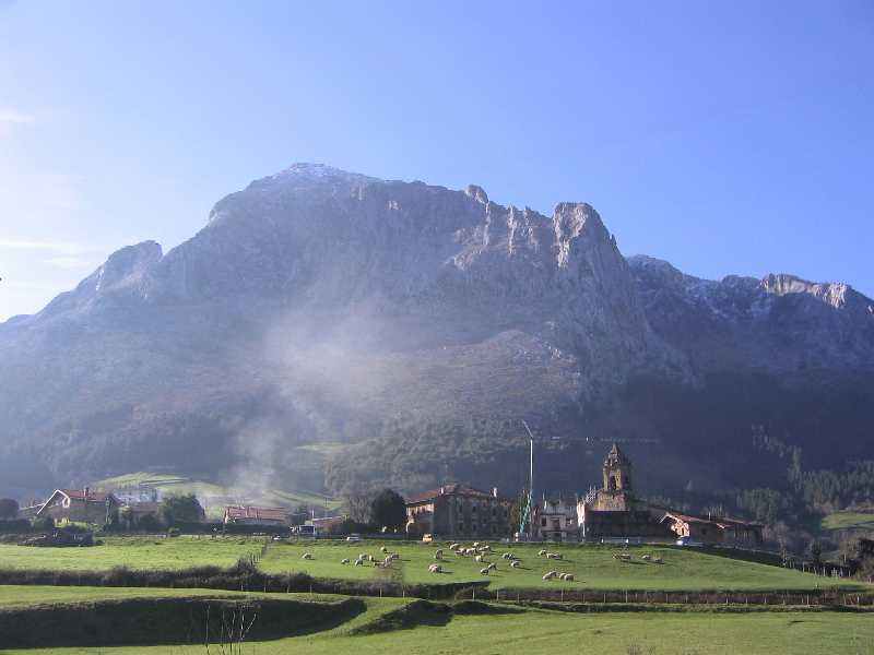 Vista geneal del barrio de Arrazola Vista general de Arrazola, barrio de Achondo en Vizcaya, País Vaco, España. Bajo el monte Amboto.